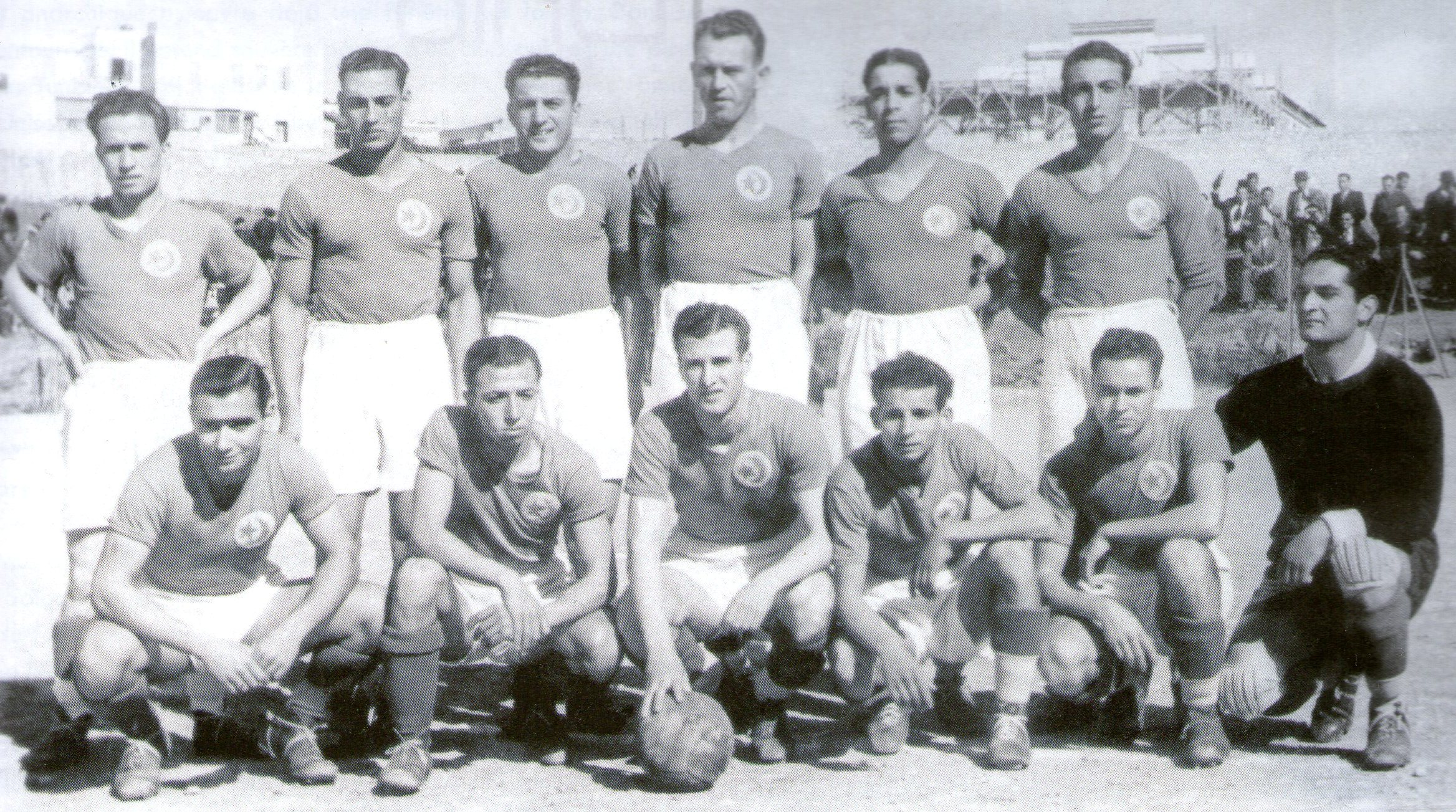 Photo de la sélection tunisienne de football en 1939Debout de gauche à droite : Kacem (EST), Abdessalem (CA), Azopardi (ESO Ferryville), Mehl (Racing Club), Bransi (EST), Canino (Italia)Accroupis de gauche à droite : Hédi Ben Ammar (CA), Salah Akacha (CA), Ducousseau (USB), Rachid Sehili (ESS), Ben Cheikh (CAB), André Tuil (UST)